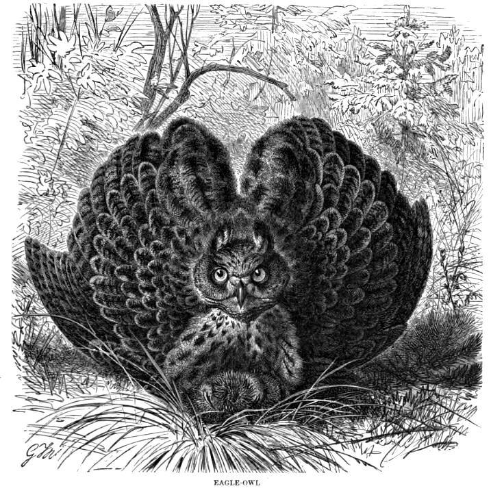 Eagle Owl (Bubo bubo)